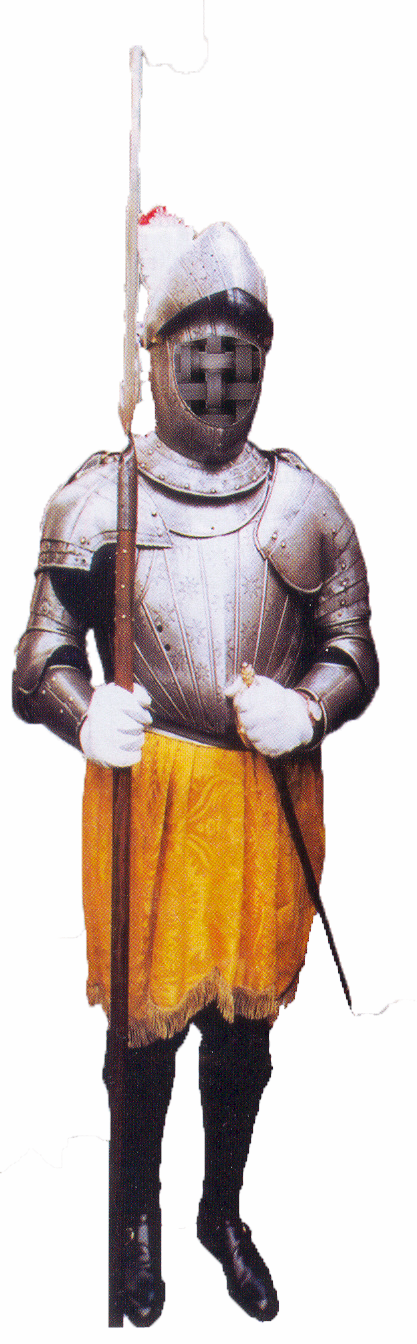 Hábito de la Hermandad de Armados de Ntro. Padre Jesús Nazareno de Ocaña (Toledo)